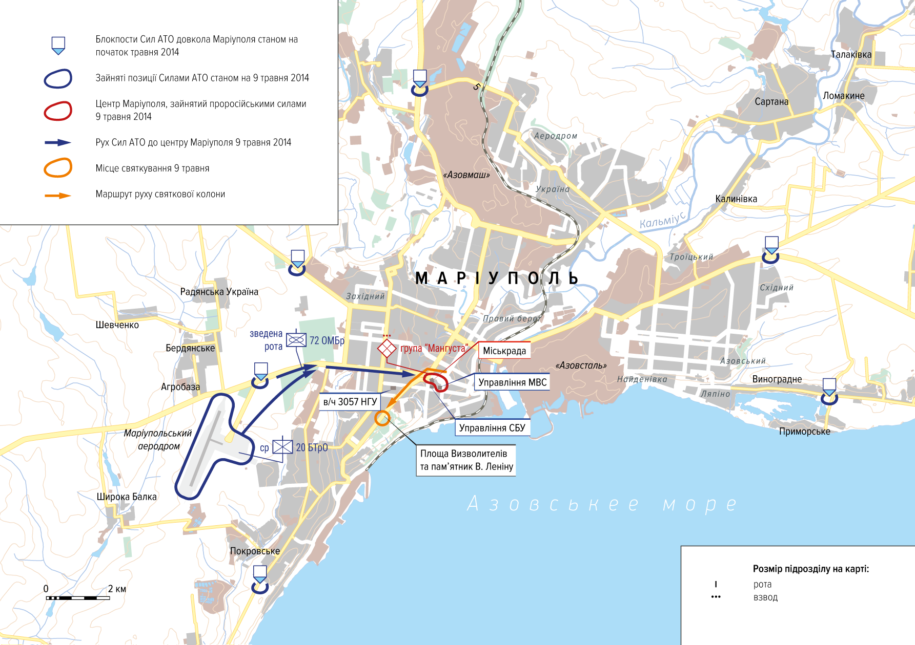 Бій в Маріуполі 09.05.2014. Загальна ситуація